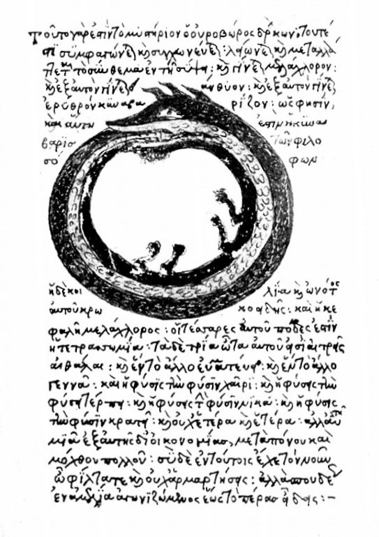 Ourouboros, le serpent qui se mange la queue, symbole de l'unité du monde, dans l'alchimie gréco-égyptienne du III e siècle. Zosime introduisit son usage en alchimie